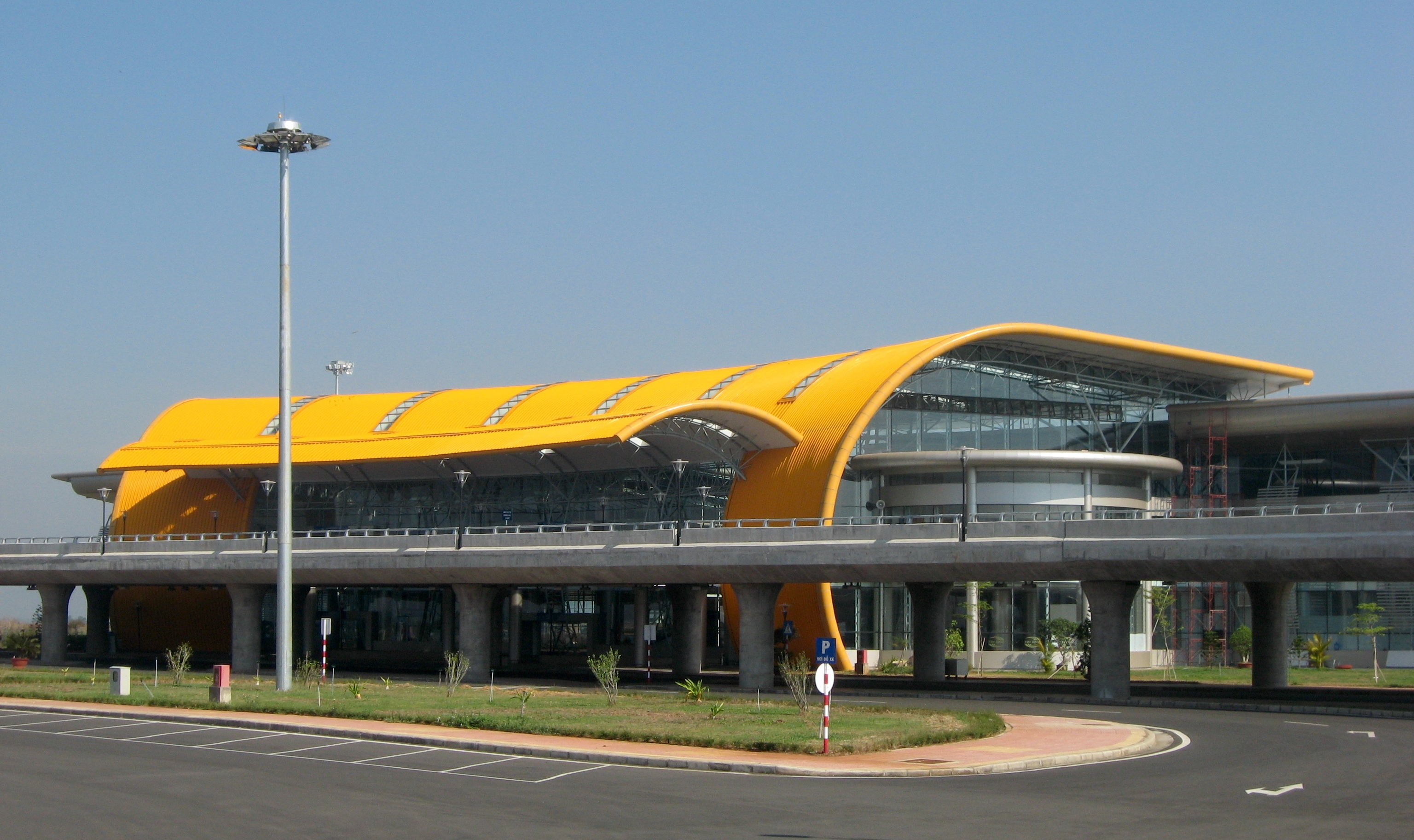 Lien Khuong Airport